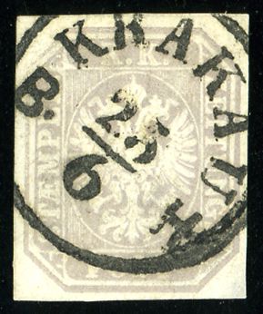 Timbre pour Journaux de l' Autriche KK émis en 1863, oblitéré à Krakau Gare (Cracovie, Galicie polonaise)